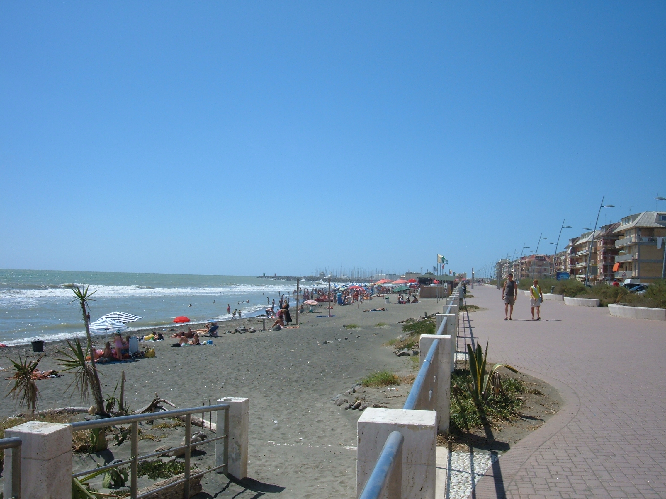 Der Strand von Lido di Ostia. Hauptattraktion der Stadt.